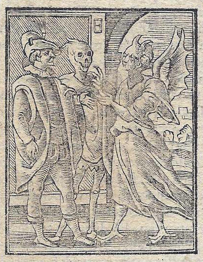 Aus einem anonymen Totentanz des 16. Jahrhunderts. Täufer, Tod und Teufel. Der Tod übergibt den Täufer dem Teufel. Der Mann rechts im Bild ist aufgrund einer auffälligen schwarz-weisen Markierung am Hut als konspirativer Anhänger der Täuferbewegung zu identifizieren. Die konspirativ tätigen Täufer sollen sich aufgrund geheimer Zeichen an der Kleidung gegenseitig erkannt haben.